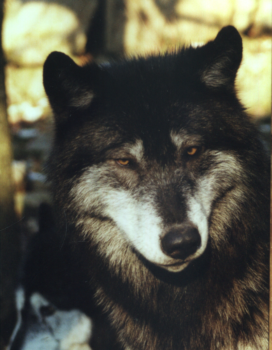 Loup du Canada (Canis lupus mackenzii)